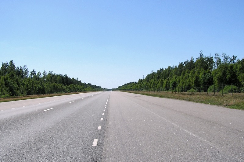 Eneryda flygfält från öster, sommaren 2008.